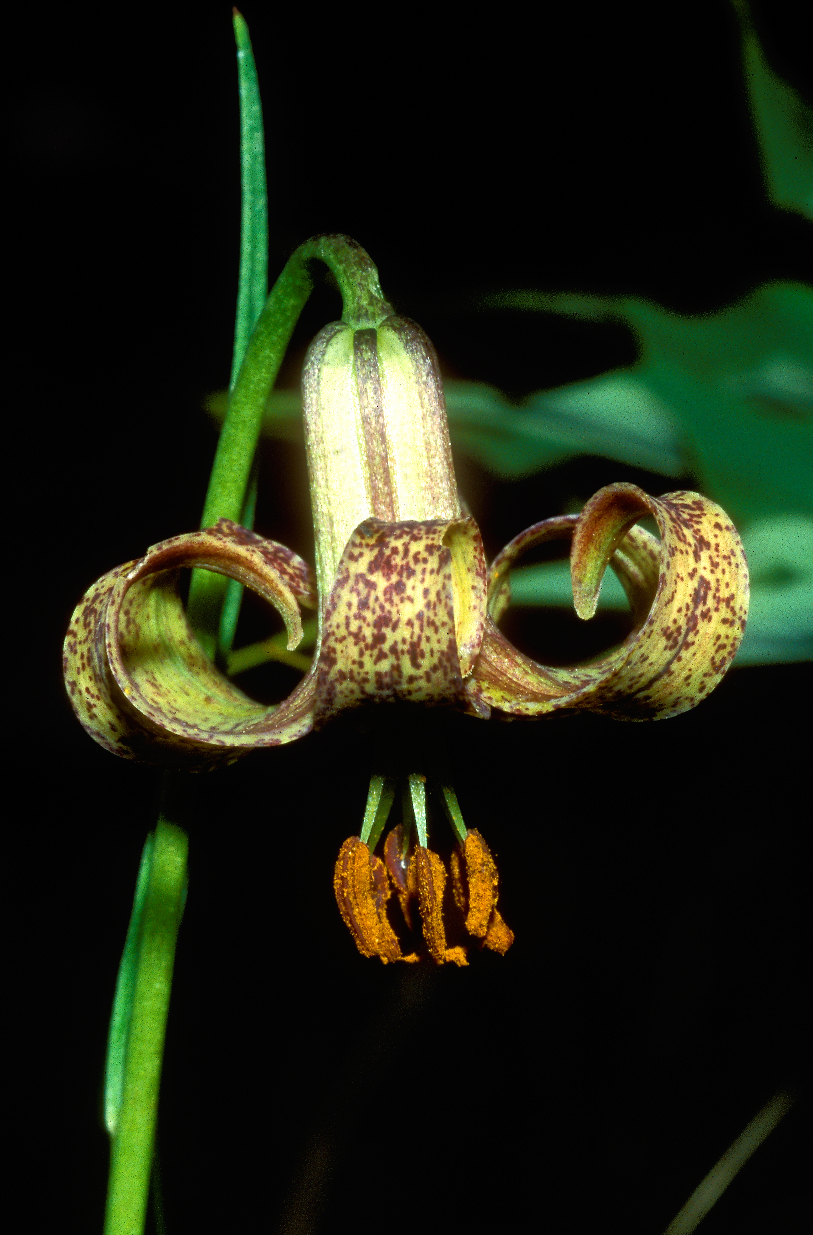 Lilium habaense in habitat, Gang Ho Ba, Yunnan, China